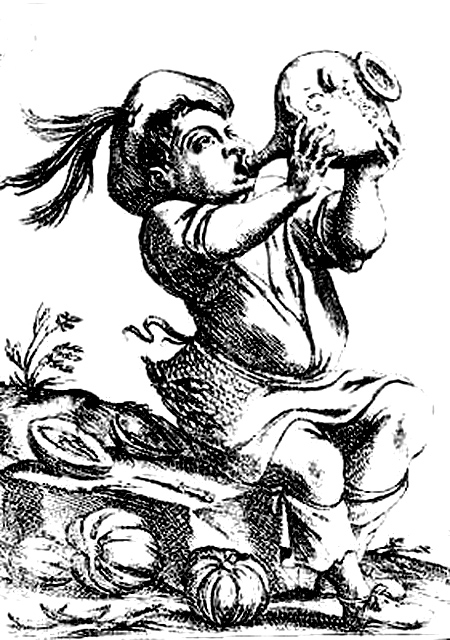 Gargoulette